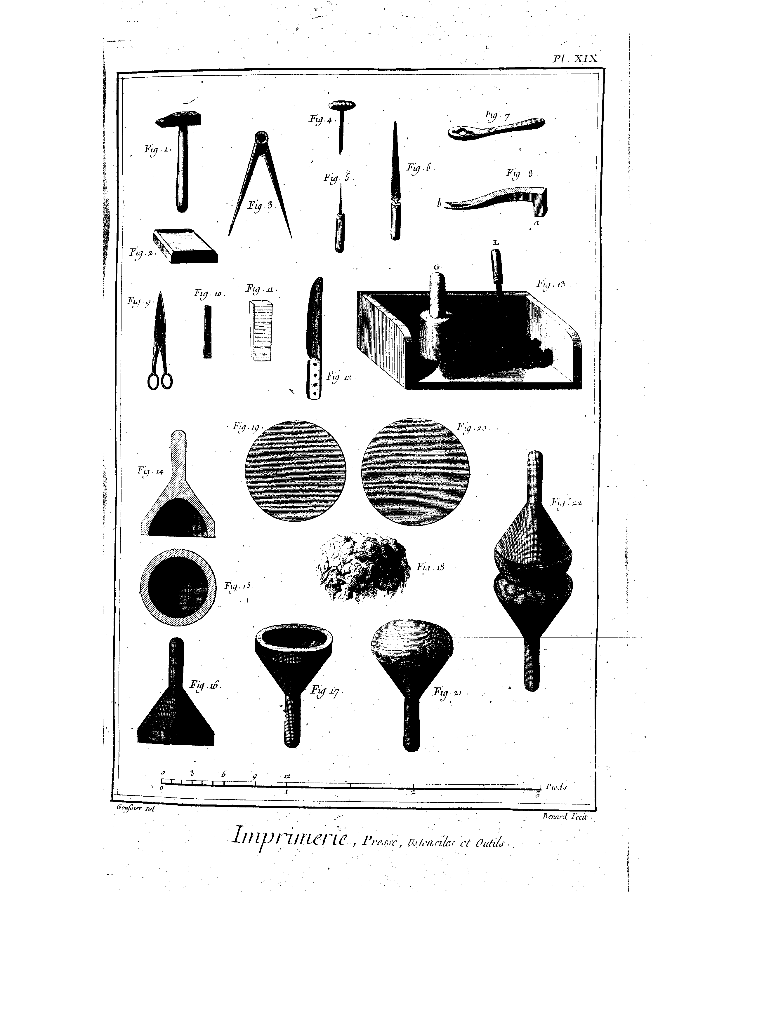 Planches de l'Encyclopédie de Diderot et d'Alembert, volume 6